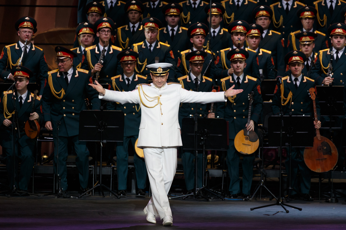 Торжественный вечер, посвященный 90-летию со дня основания Дважды Краснознаменного ордена Красной Звезды академического ансамбля песни и пляски Российской армии имени А. В. Александрова в Государственном академическом Большом театре России.